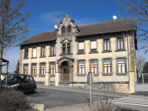 Ancienne école de Bénestroff